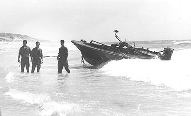 סירת מחבלים שנרדפה על ידי ספינת דבור והגיעה לחוף בניצנים.